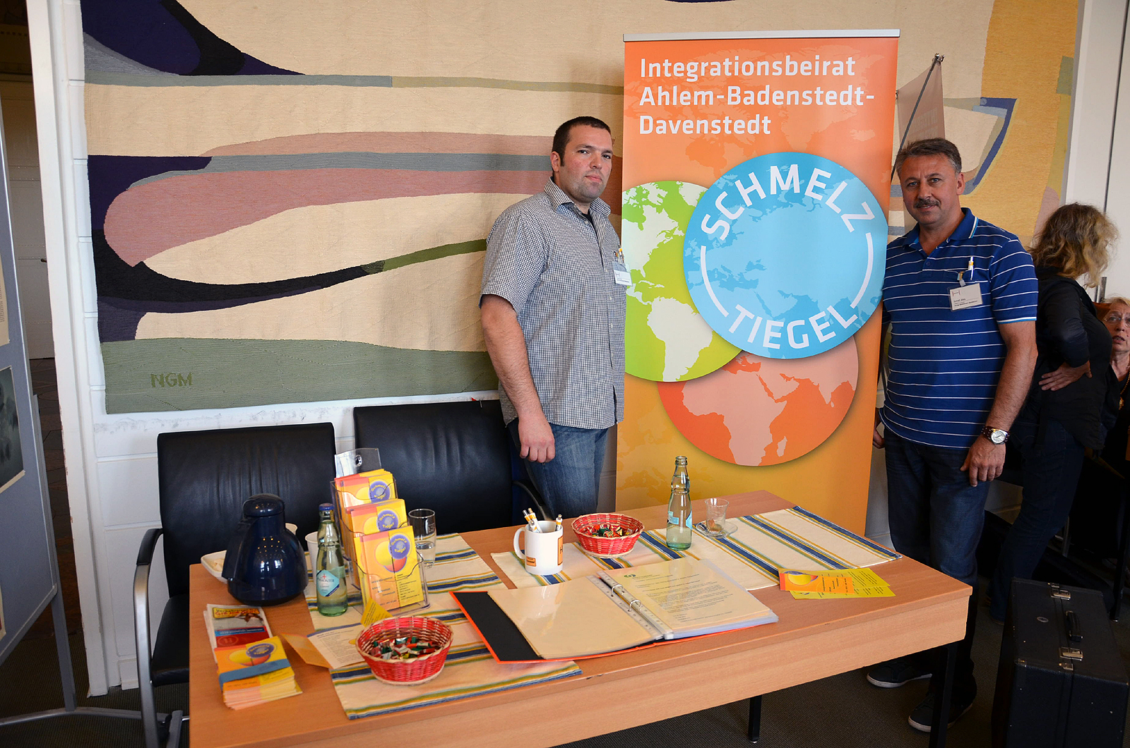 Am Tag der offenen Tür des Neuen Rathauses in Hannover im Rahmen der Feierlichkeiten 100 Jahre Neues Rathaus informierten Alexey Rechter und Ismael Ates im Gobelinsaal über den Integrationsbeirat Ahlem-Badenstedt-Davenstedt ...